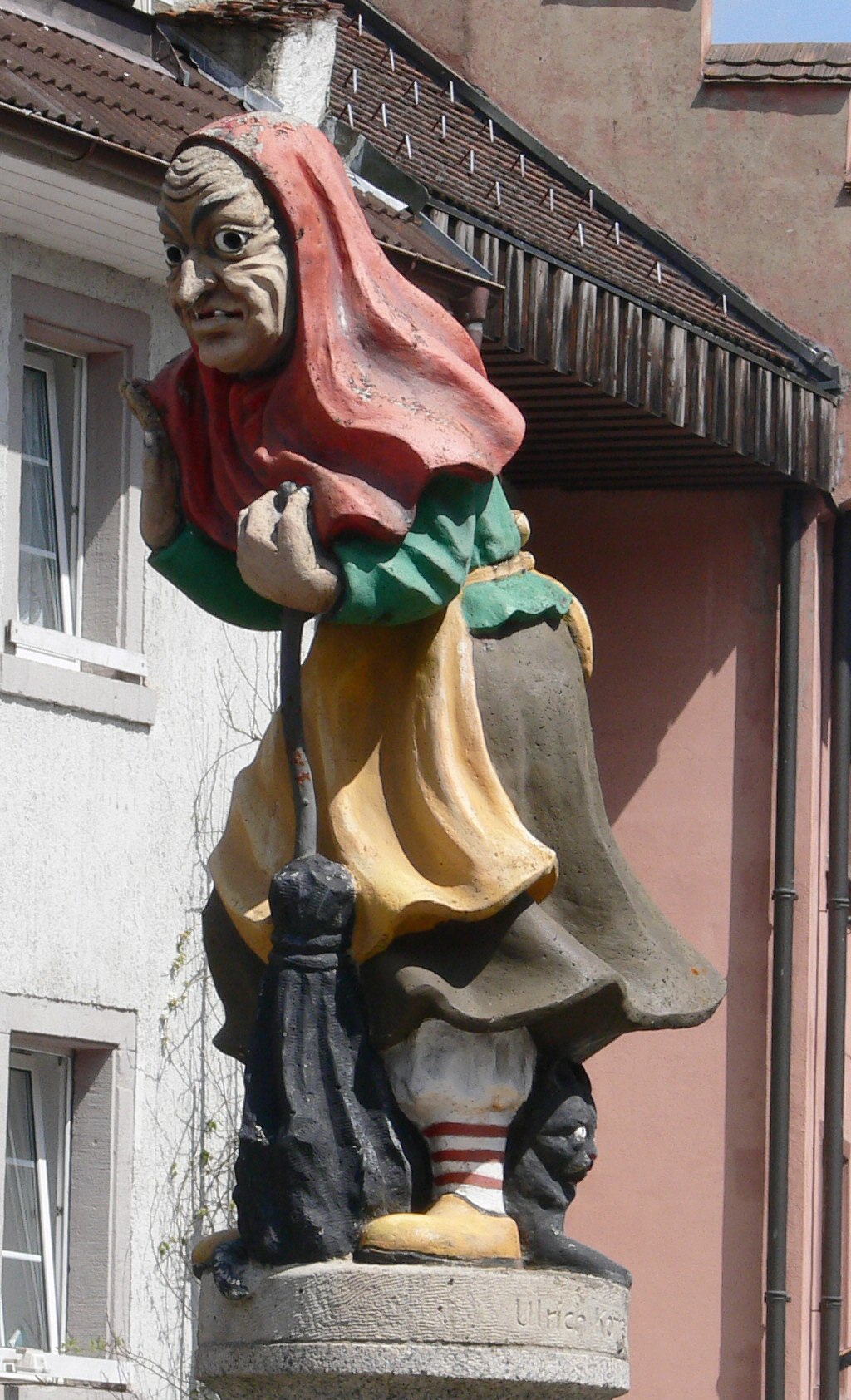 Löffingen, Landkreis Breisgau-Hochschwarzwald Hexenbrunnen, Detail: Hexenfigur